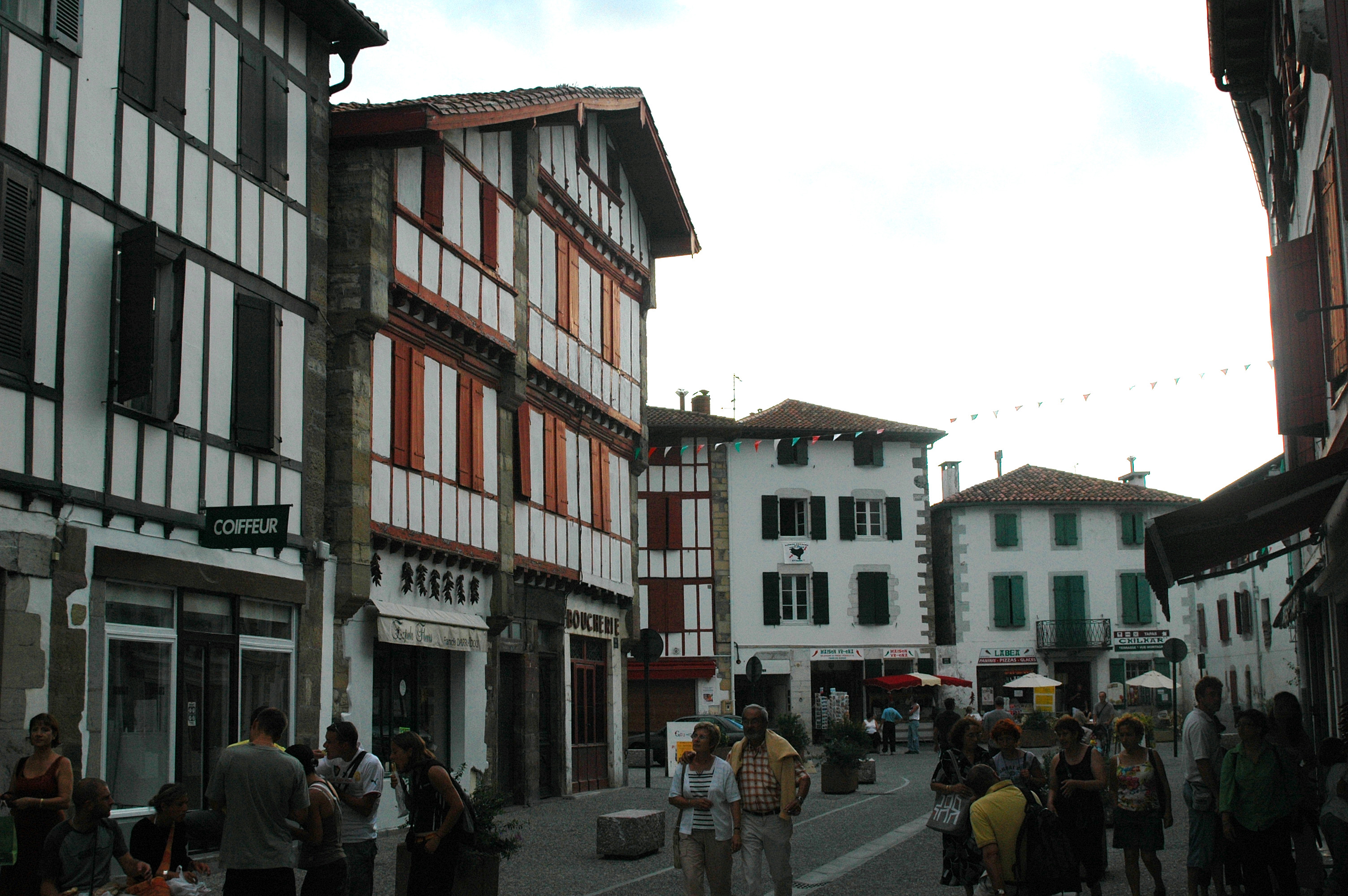 Espelette, le village. Photo prise le 08/08/06 par Harrieta171